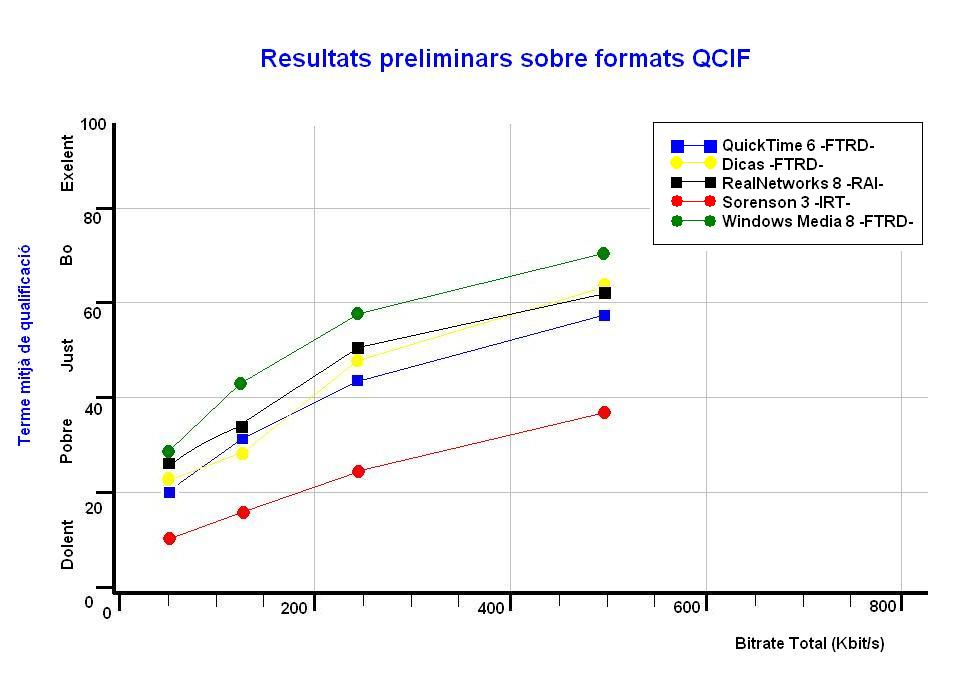 Grafica de comparacion de codecs y su respectiva calidad